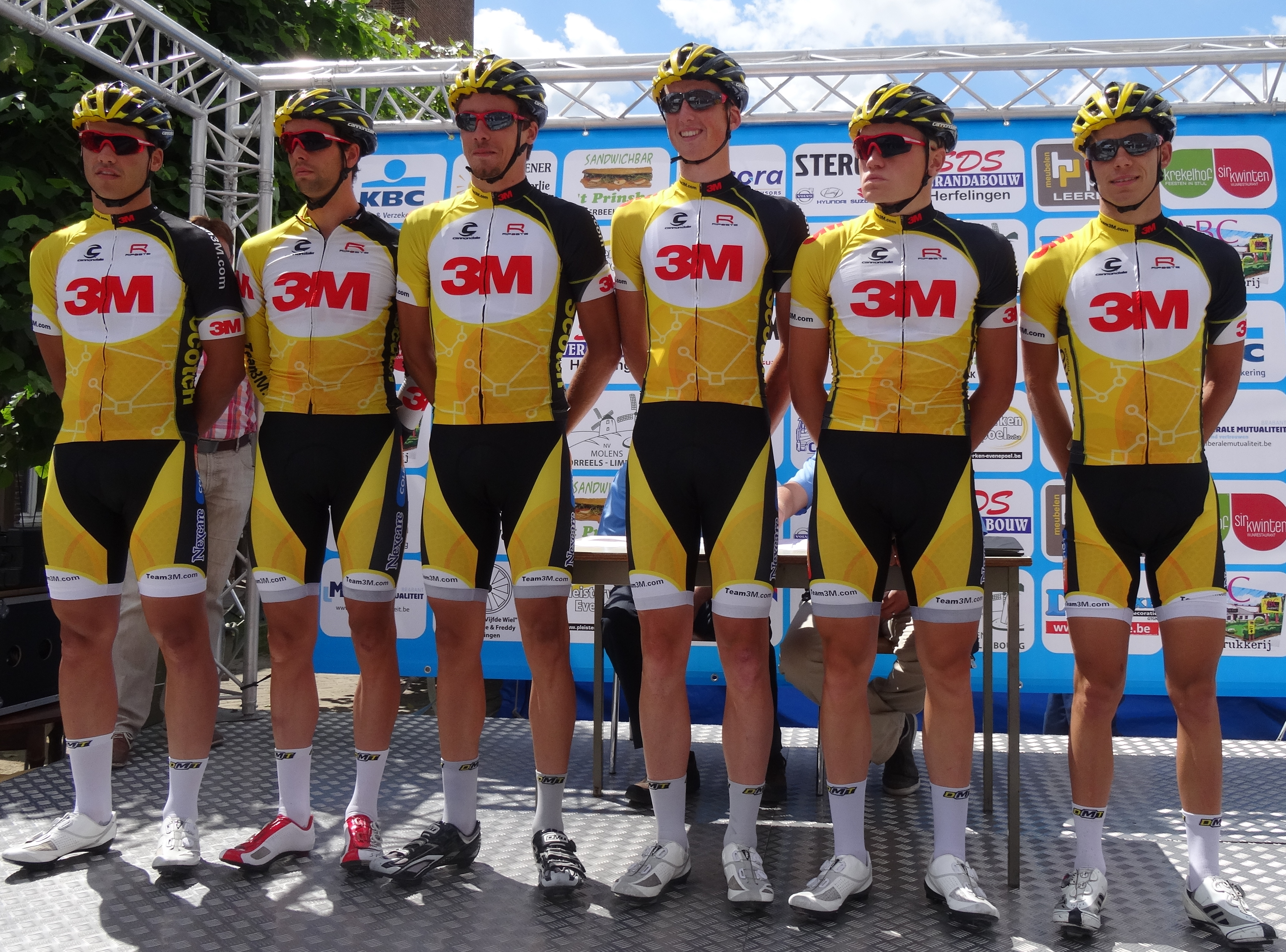 Reportage photographique réalisé le mercredi 25 juin à l'occasion du départ et de l'arrivée de l'Internationale Wielertrofee Jong Maar Moedig 2014 à Oetingen (Gooik), Belgique.